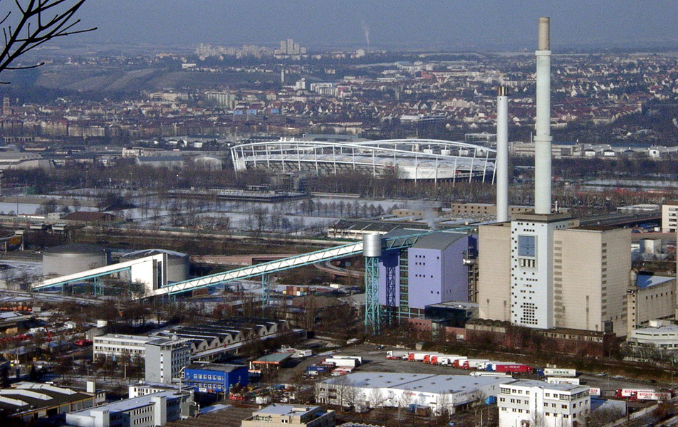 GNU-FDL Kraftwerk Stuttgart - Gaisburg von Benutzer:Enslin selbst fotografiert am 11.1.2003